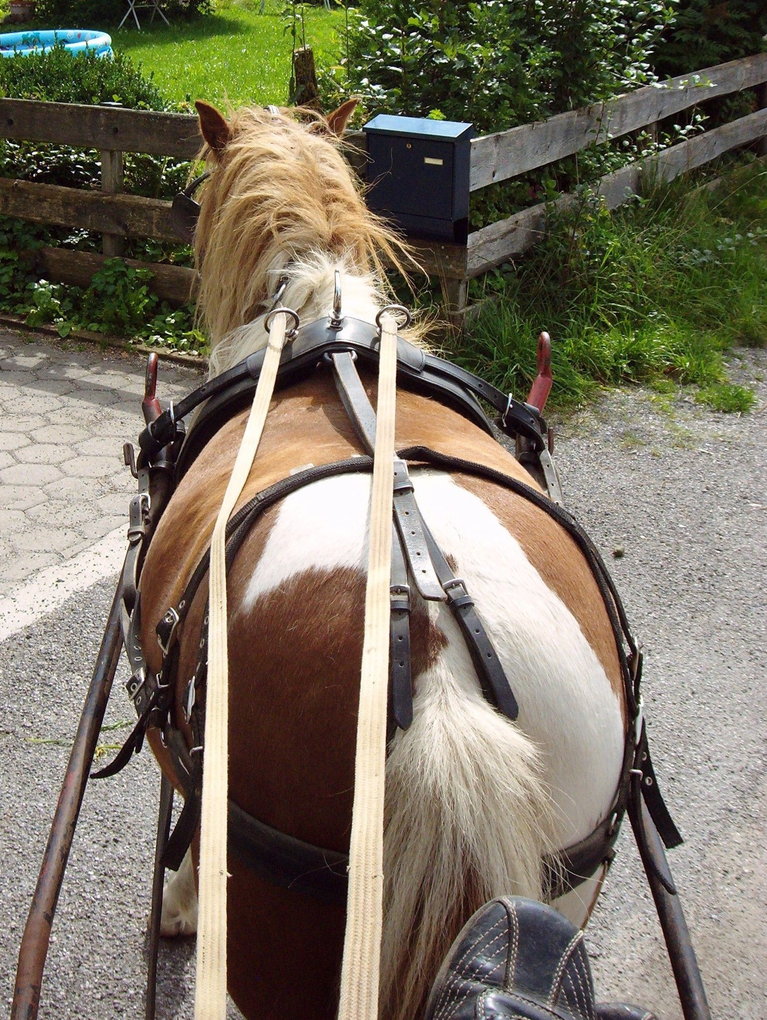 Selett mit Hintergeschirr und Schweifriemen